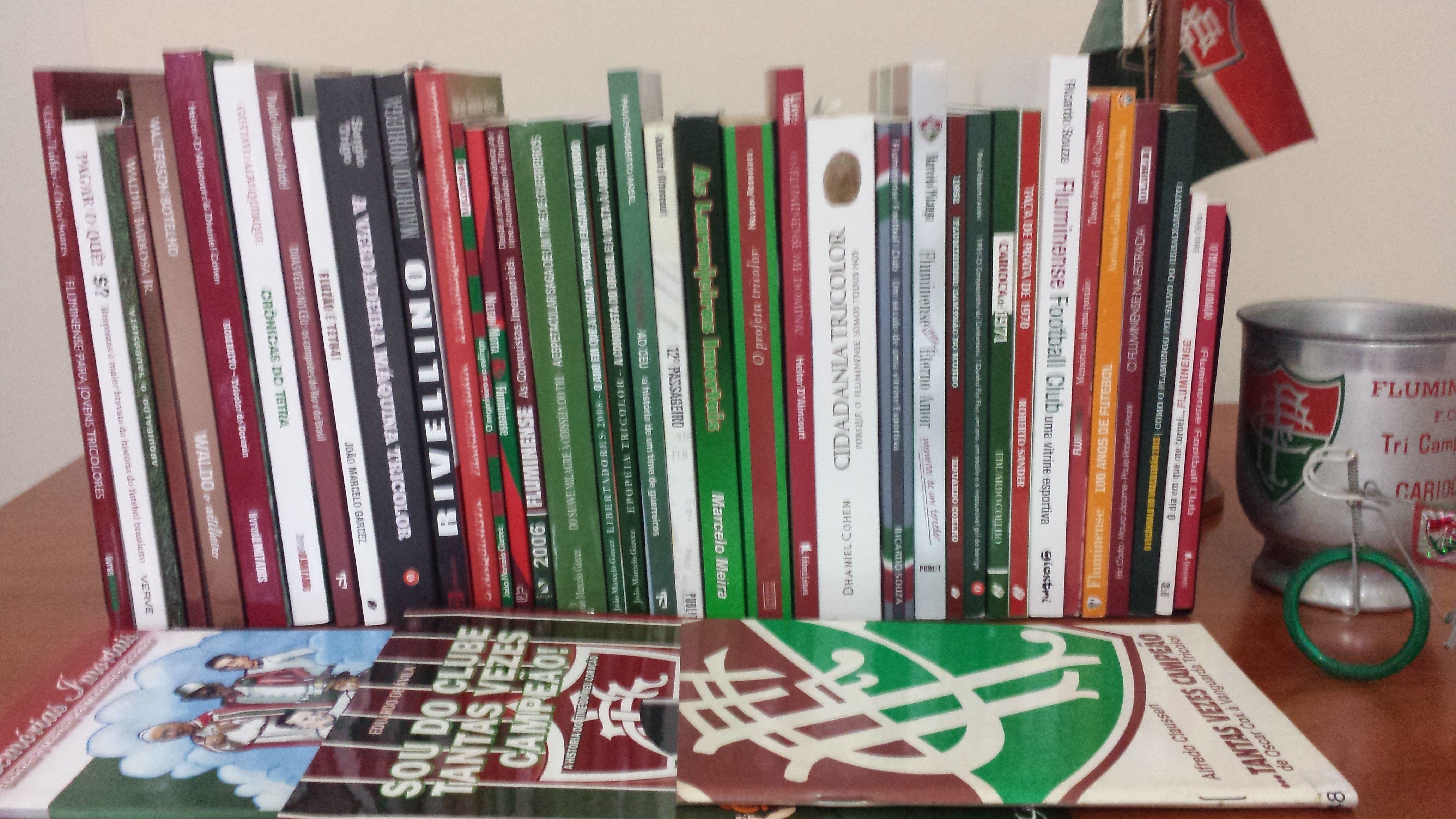 Livros sobre o Fluminense Football Club.